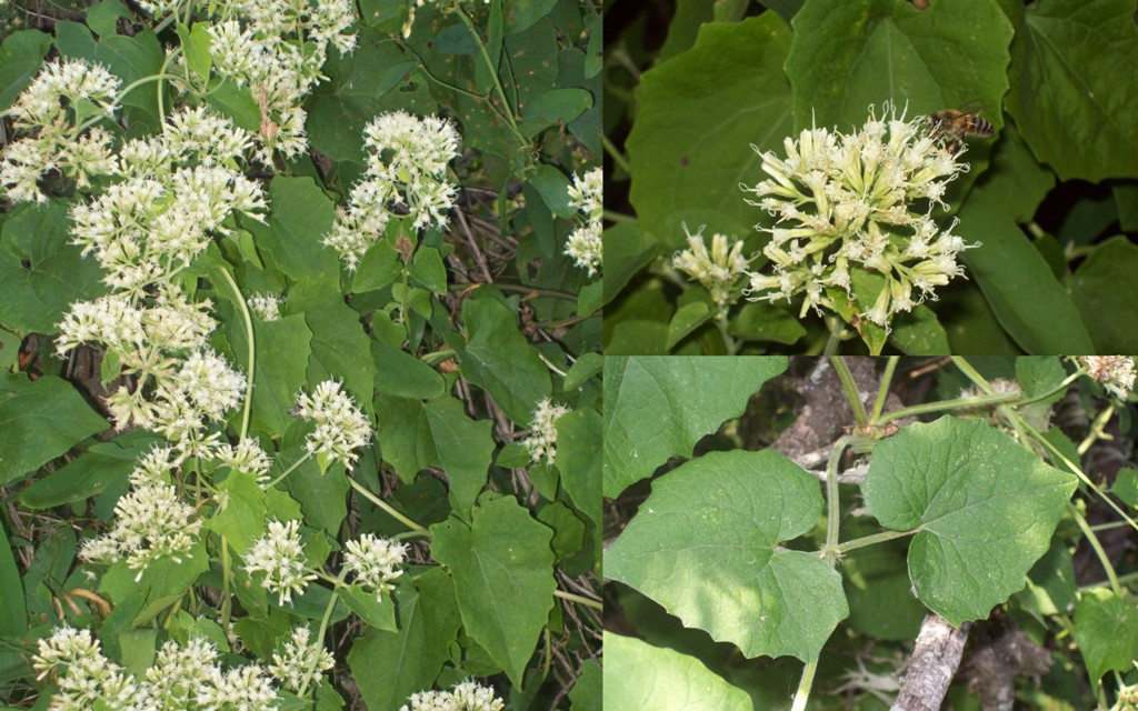 Mikania cordifolia. Asteraceae. Fotos tomadas bajo el bosque ribereño al margen del Río Negro en Palmar, departamento de Río Negro, Uruguay.